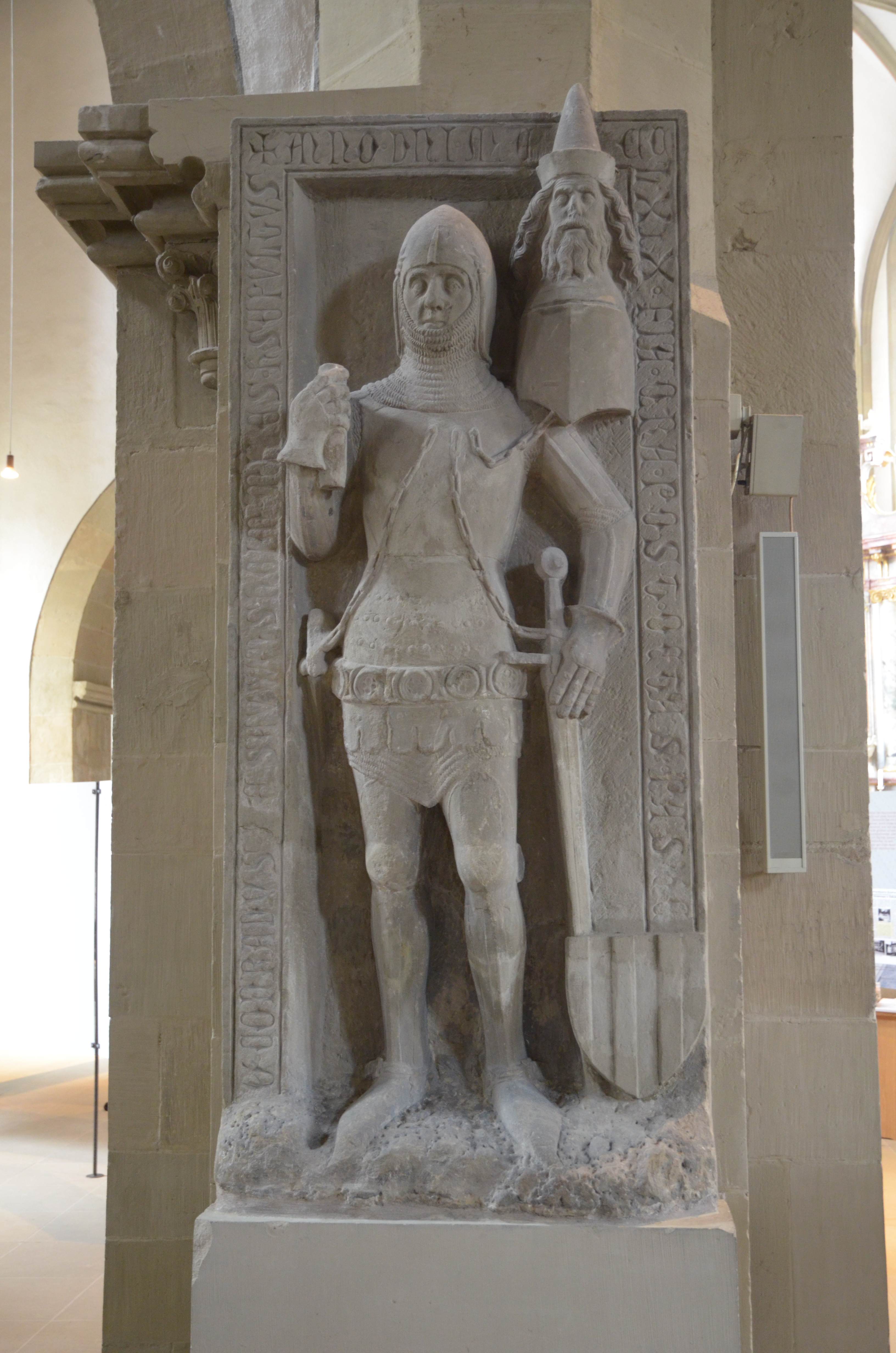 St. Johannis in Schweinfurt, Epitaph von Konrad von Seinsheim 1369